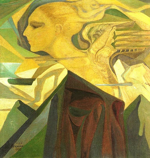 La vetta, olio su tela